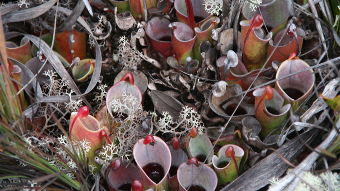 Fleischfressende Heliamphoren (Heliamphora minor), Auyan-Tepui, Venezuela